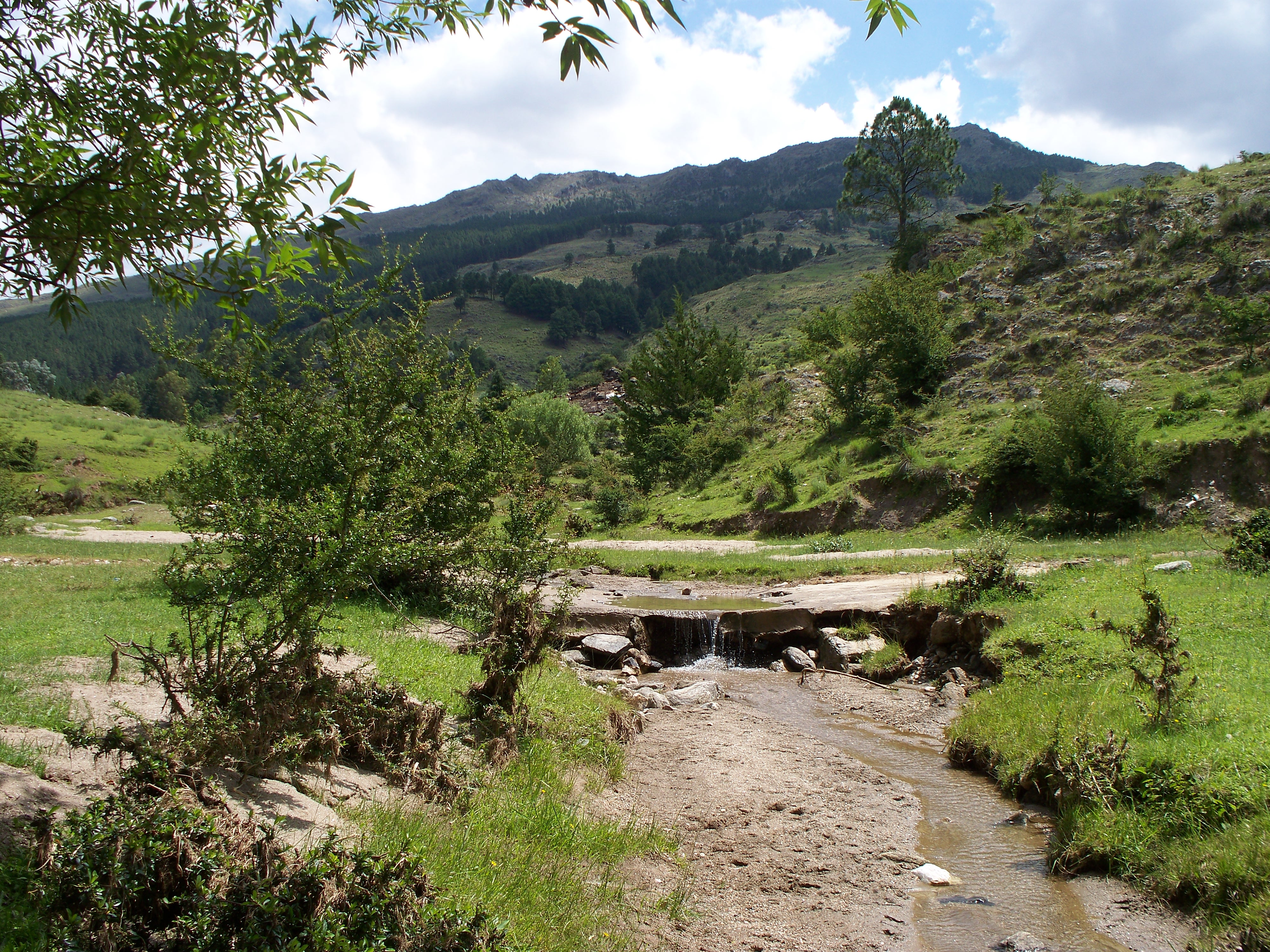 VILLA ALPINA - CORDOBA